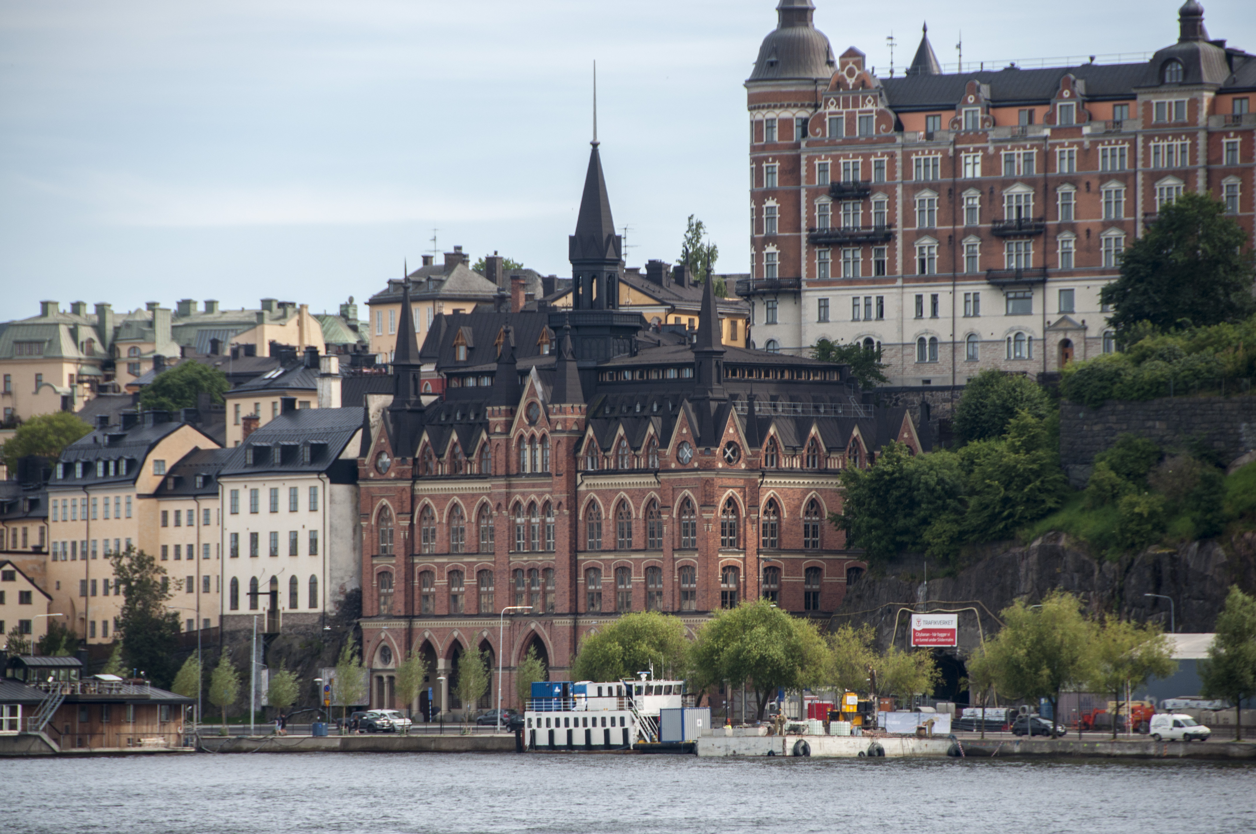 Mariahissen Söder Mälarstrand 21 Stockholm. Byggnadsår 1885 , arkitekt Gustaf Dahl.